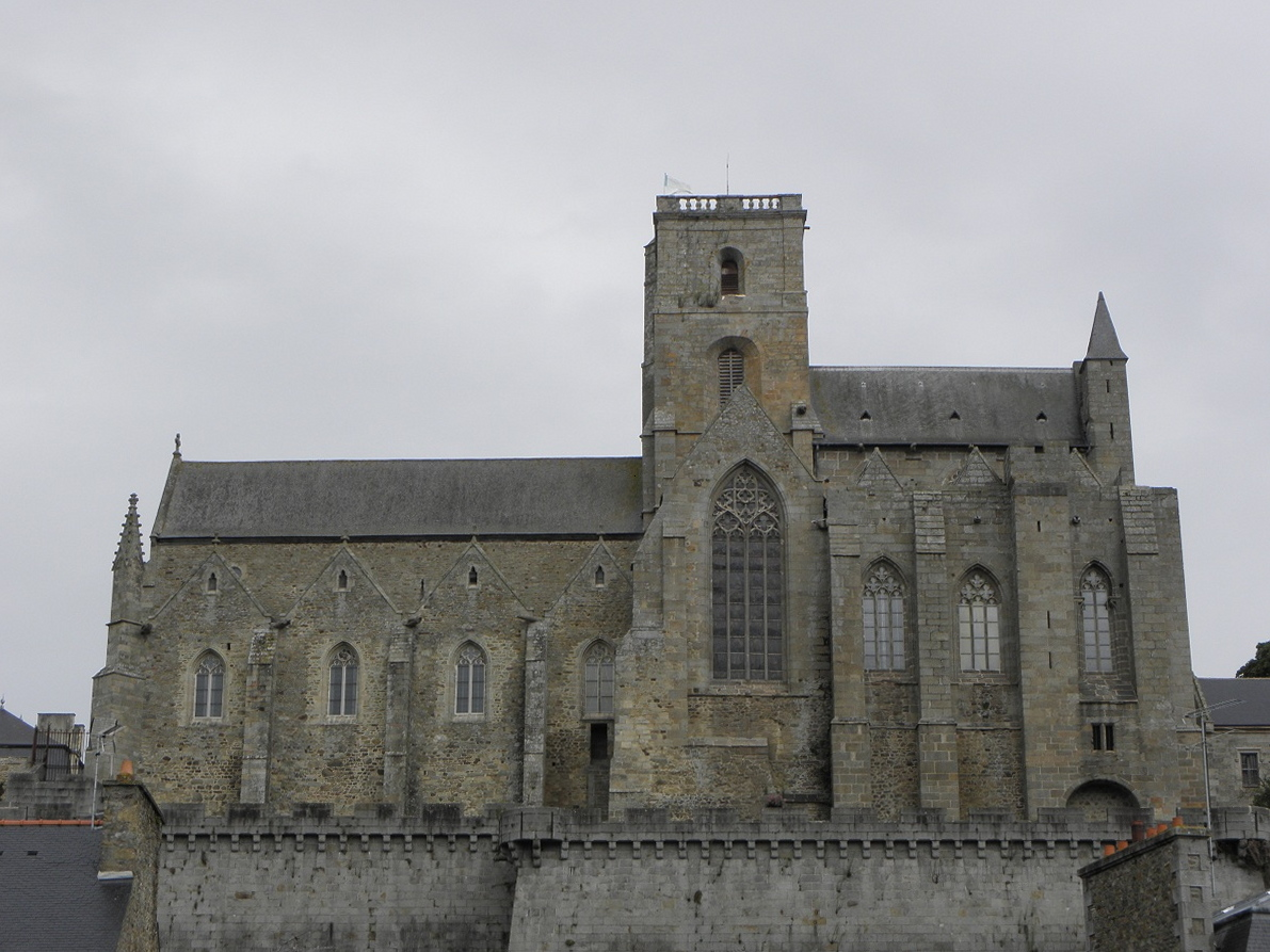 Façade sud de la collégiale Notre-Dame-de-Grande-Puissance de Lamballe (22). .